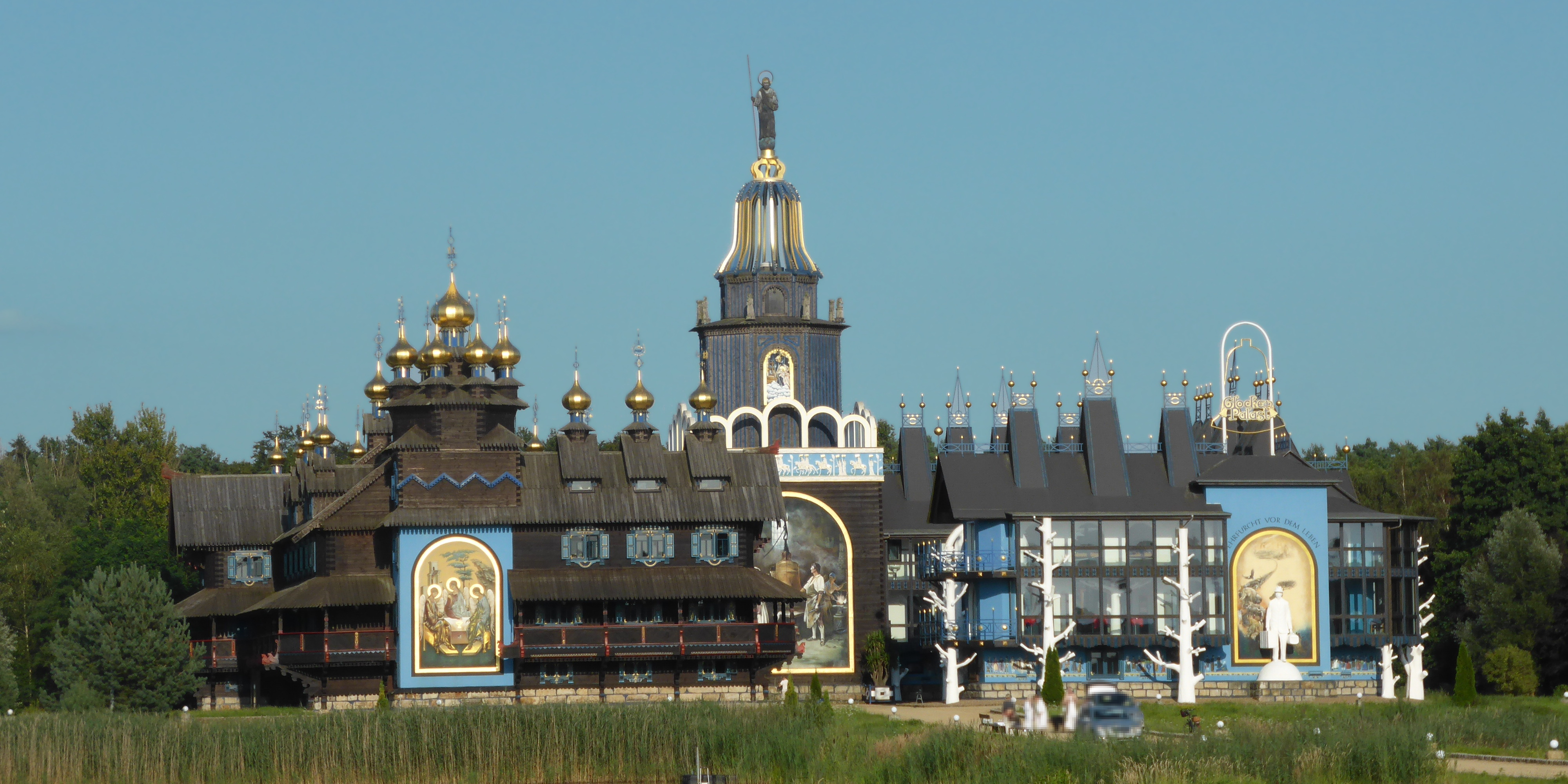 Der Glockenpalast in Gifhorn.